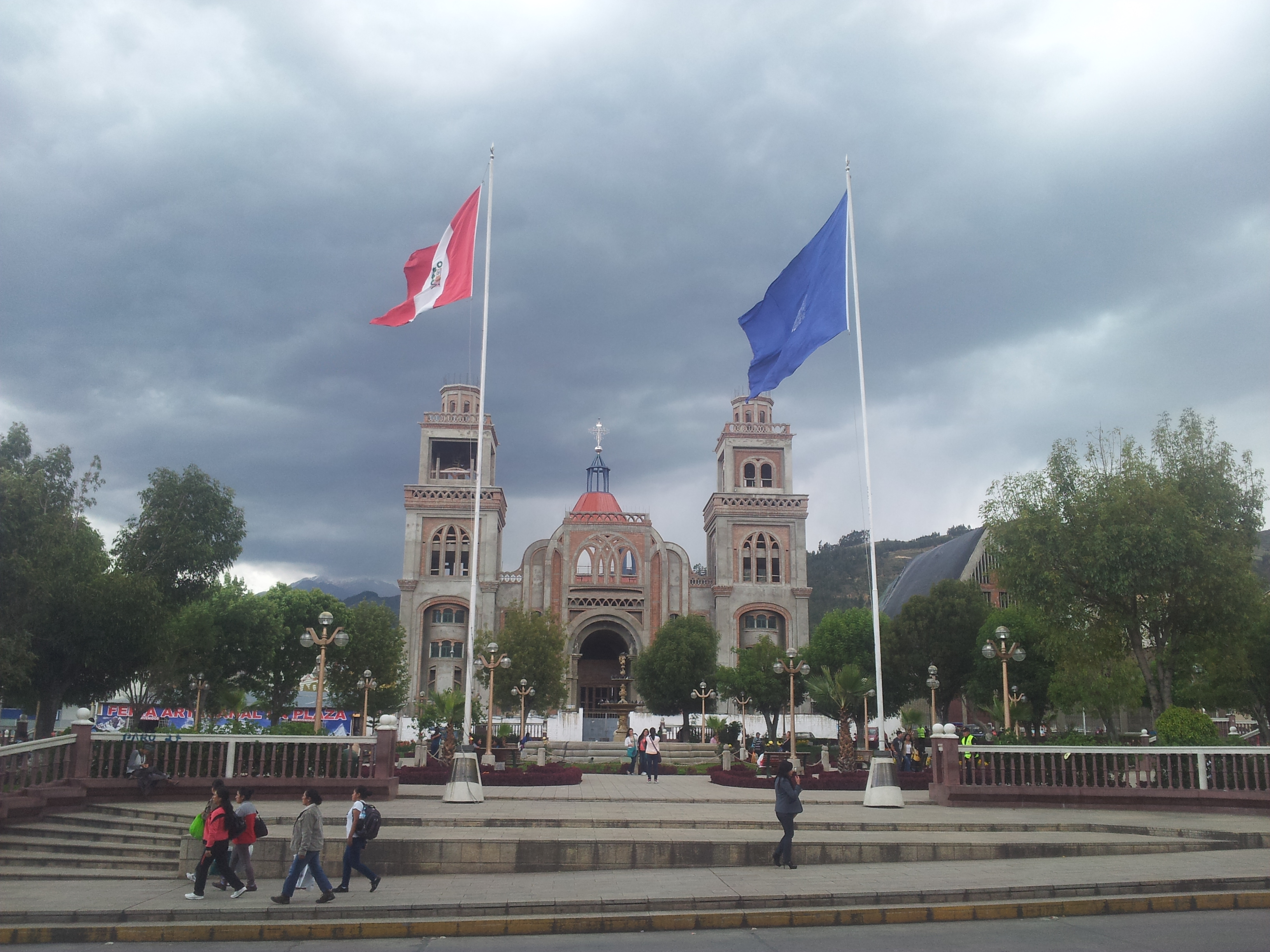 Vista de la Plaza de Armas de Huaraz, con la Catedral en construcción y las banderas de Perú y Huaraz.